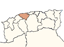 Localisation du département d'Orléansville, 1962.